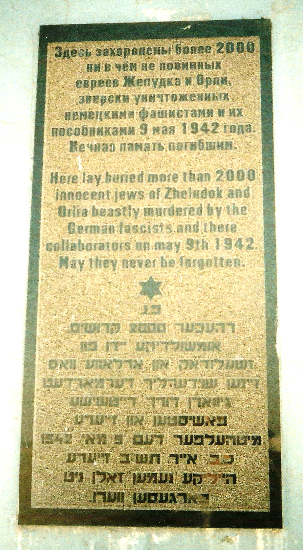 Надпись на памятнике на братской могиле евреев - жертв Холокоста в посёлке Желудок Щучинского района Гродненской области. Памятник установлен в 1959 году.